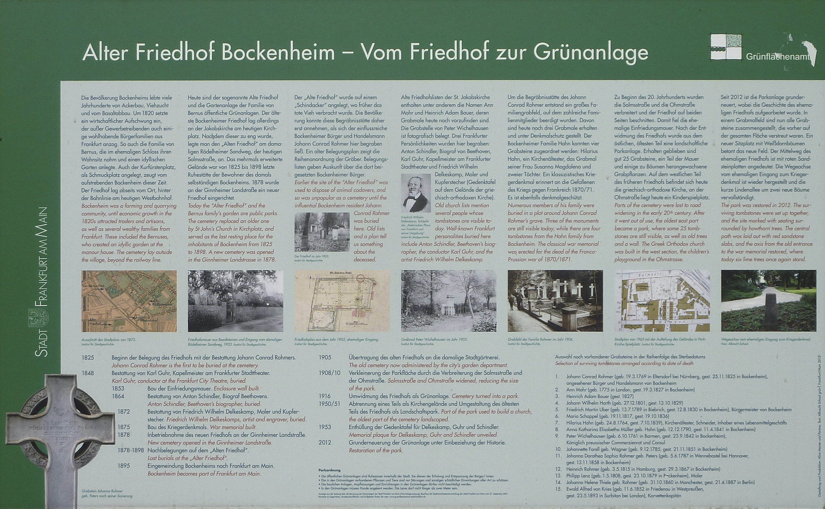 Frankfurt am Main, Stadtteil Bockenheim: Der Alte Friedhof Bockenheim ist ein von 1825 bis 1898 für Begräbnisse genutzter Friedhof, der im Jahr 1916 zu einer öffentlichen Grünanlage umgewidmet wurde. Das Foto zeigt die Informationstafel der Stadt Frankfurt, Grünflächenamt, auf dem Parkgelände